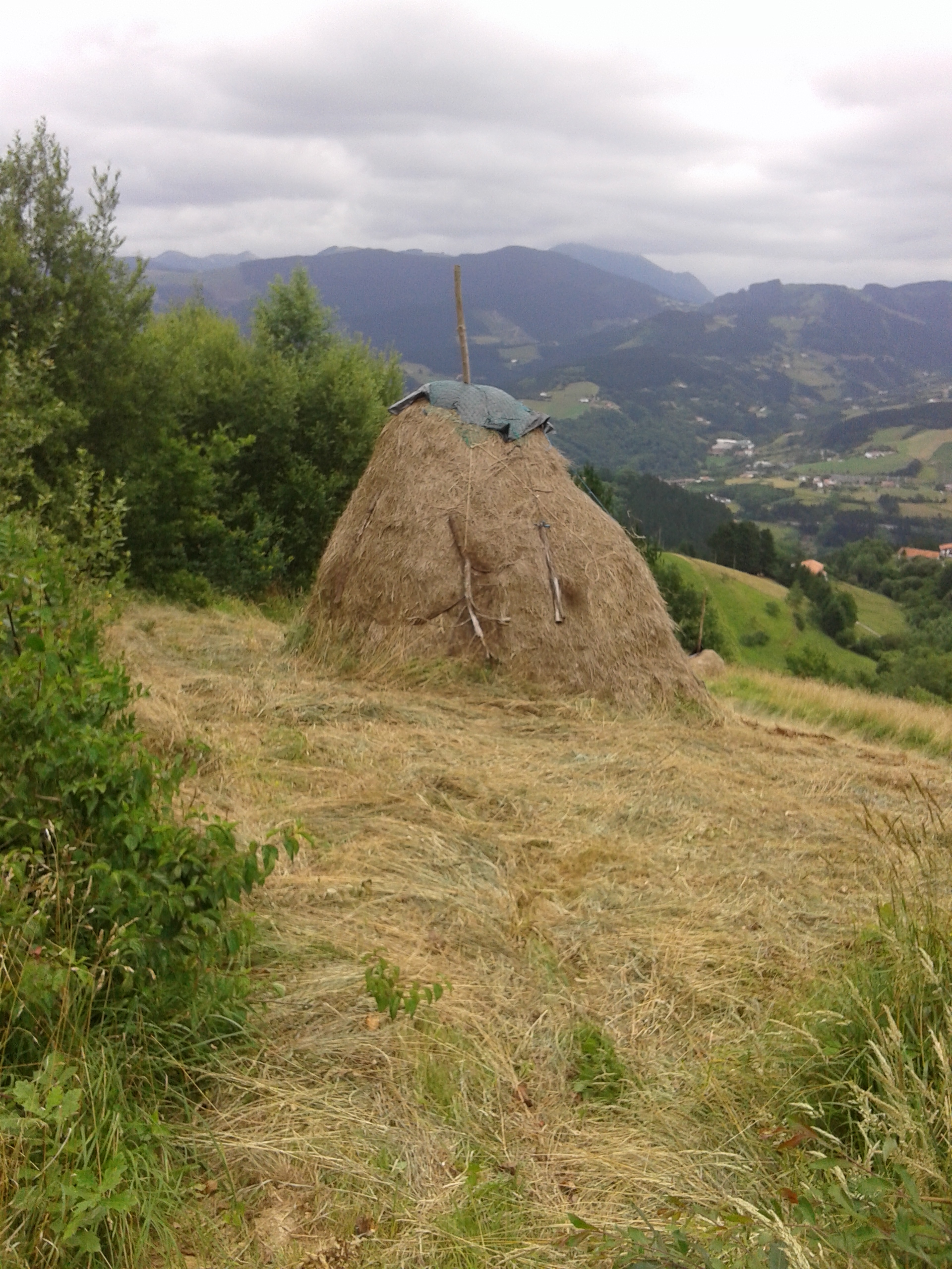 Belar-meta bat Idotorben (Elgoibar)